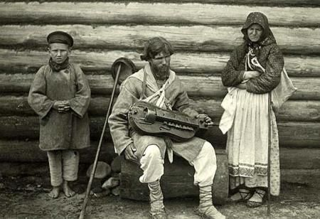 Фото начала XX века. Сделано в Игуменском уезде Минской губернии